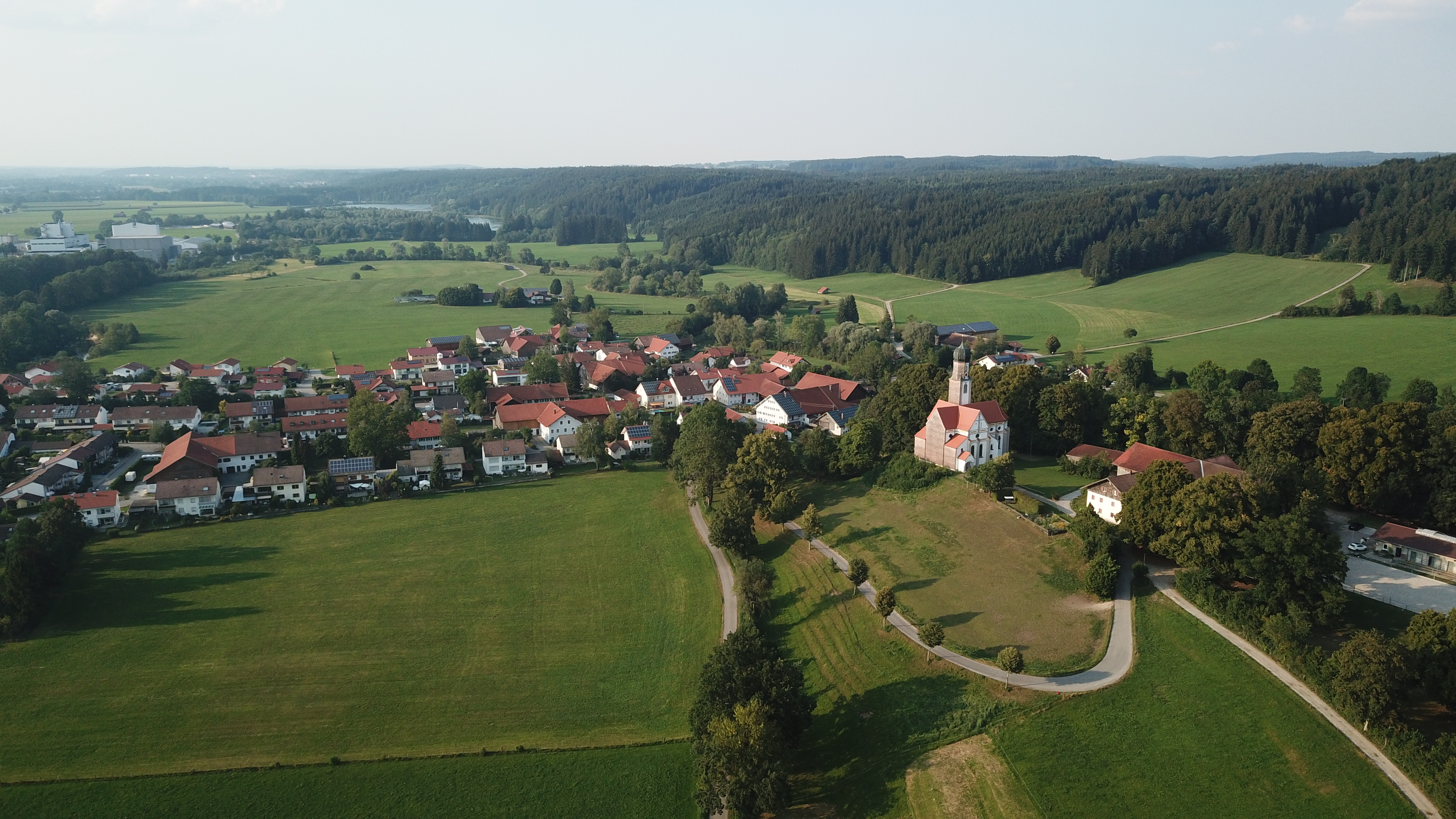 Luftaufnahme von Hörmanshofen mit Ottilienberg